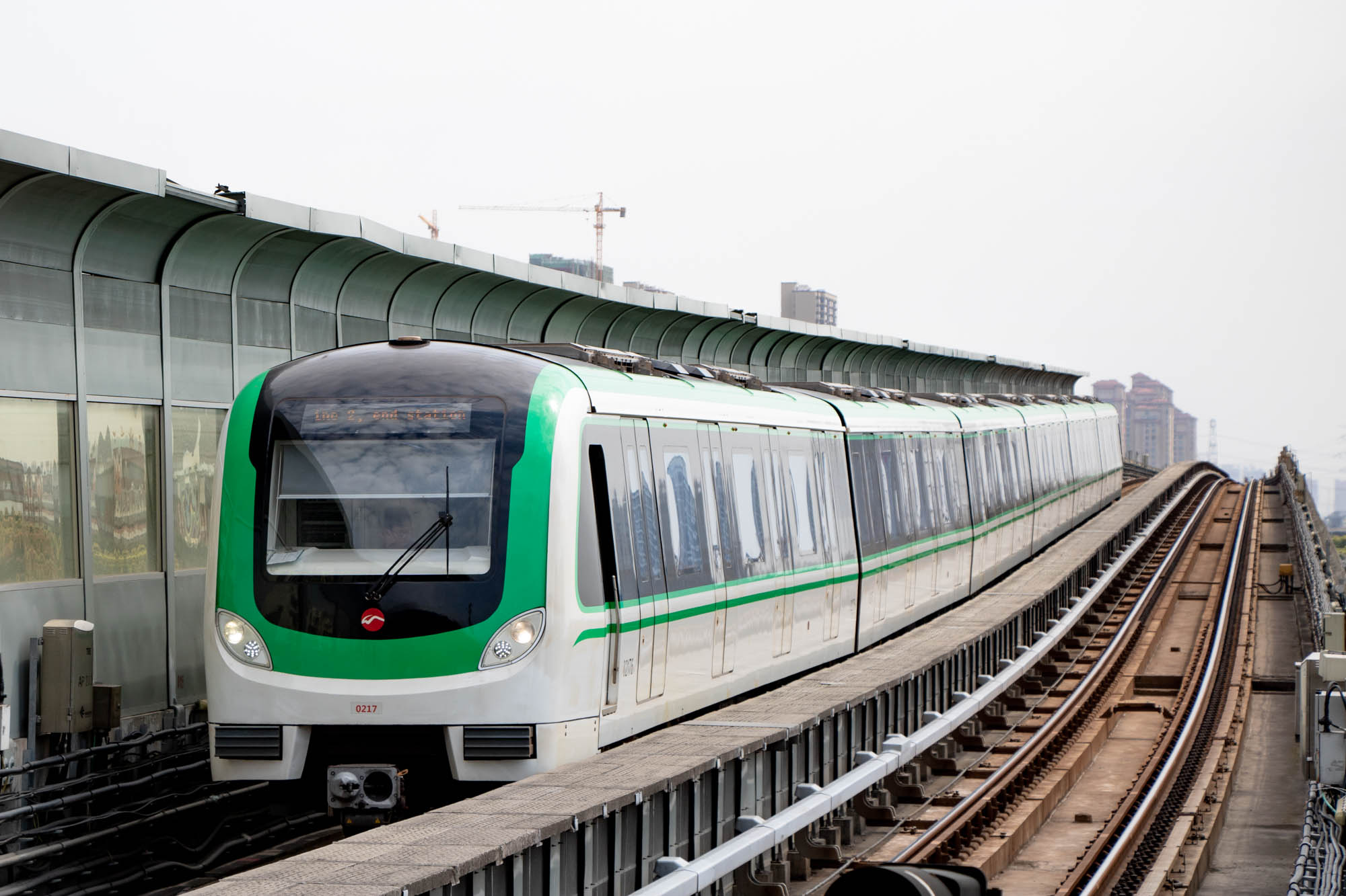 中文（中国大陆）: 无锡轨道交通2号线列车